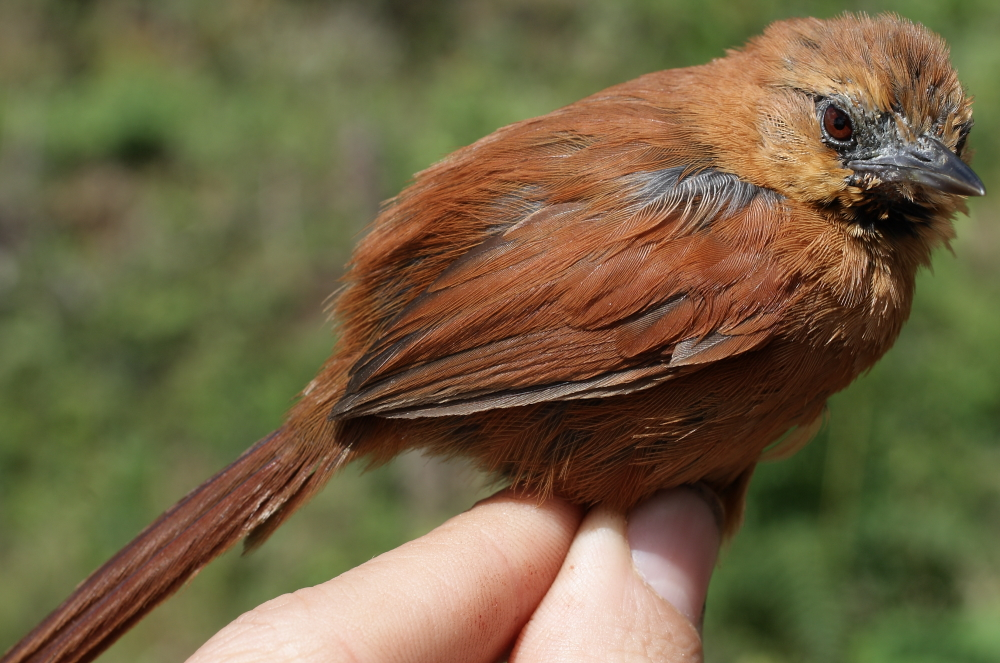 Synallaxis unirufa munoztebari Birds of Serranía de Perijá of Colombia and Venezuela (Ornitologia Colombiana [2014] 14: 62–93)